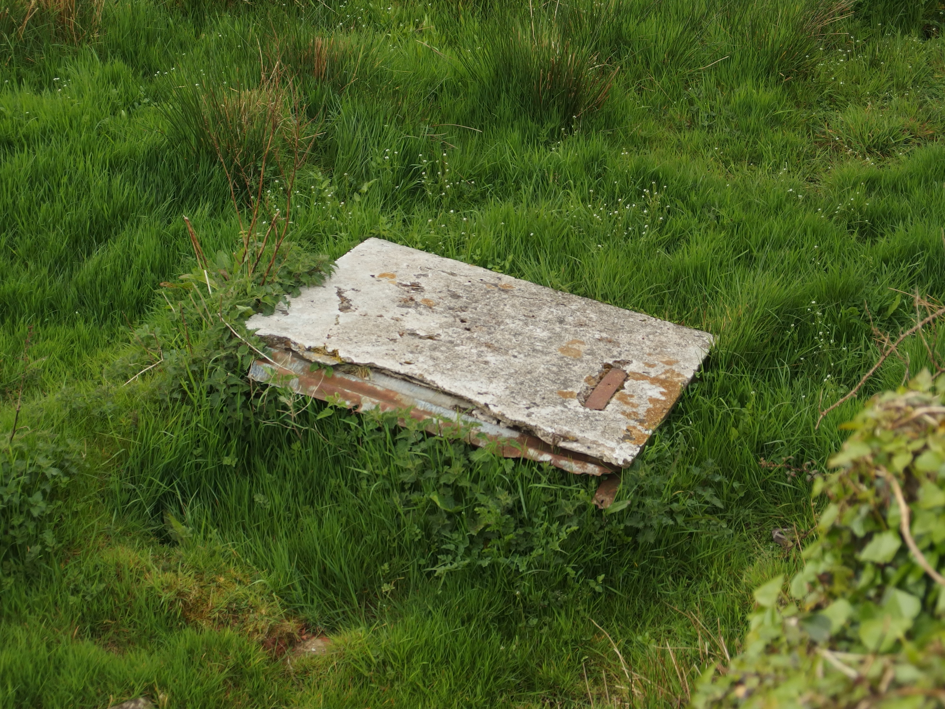 Ffynnon Seiriol, Clorach.